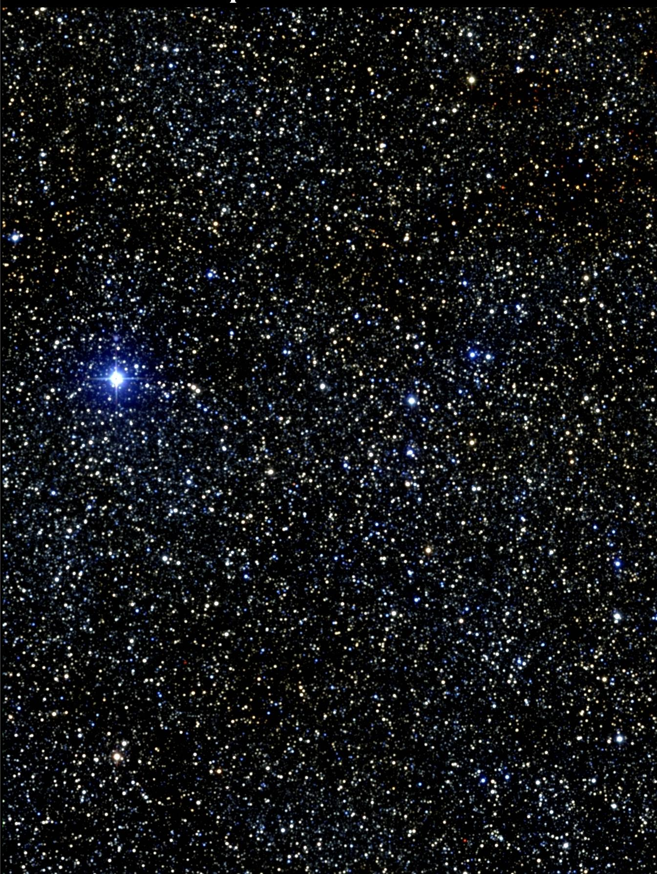 Amas du papillon source Atlas Image [or Atlas Image mosaic] obtained as part of the Two Micron All Sky Survey (2MASS), a joint project of the University of Massachusetts and the Infrared Processing and Analysis Center/California Institute of Technology, funded by the National Aeronautics and Space Administration and the National Science Foundation.